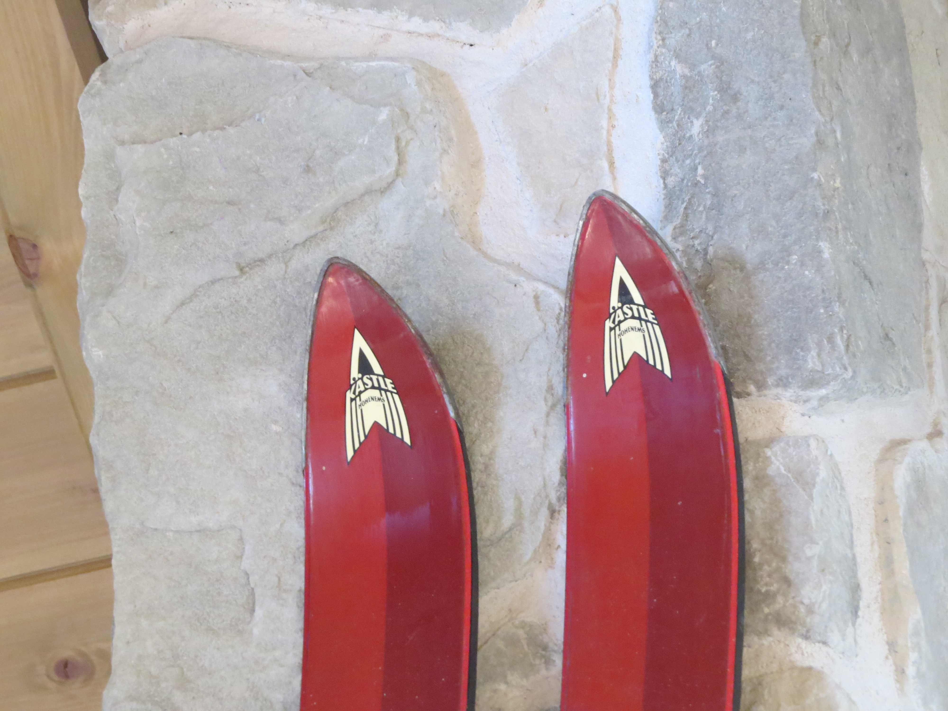 Skigebiet Mitterbach am Erlaufsee